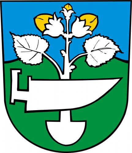 Poličná znak